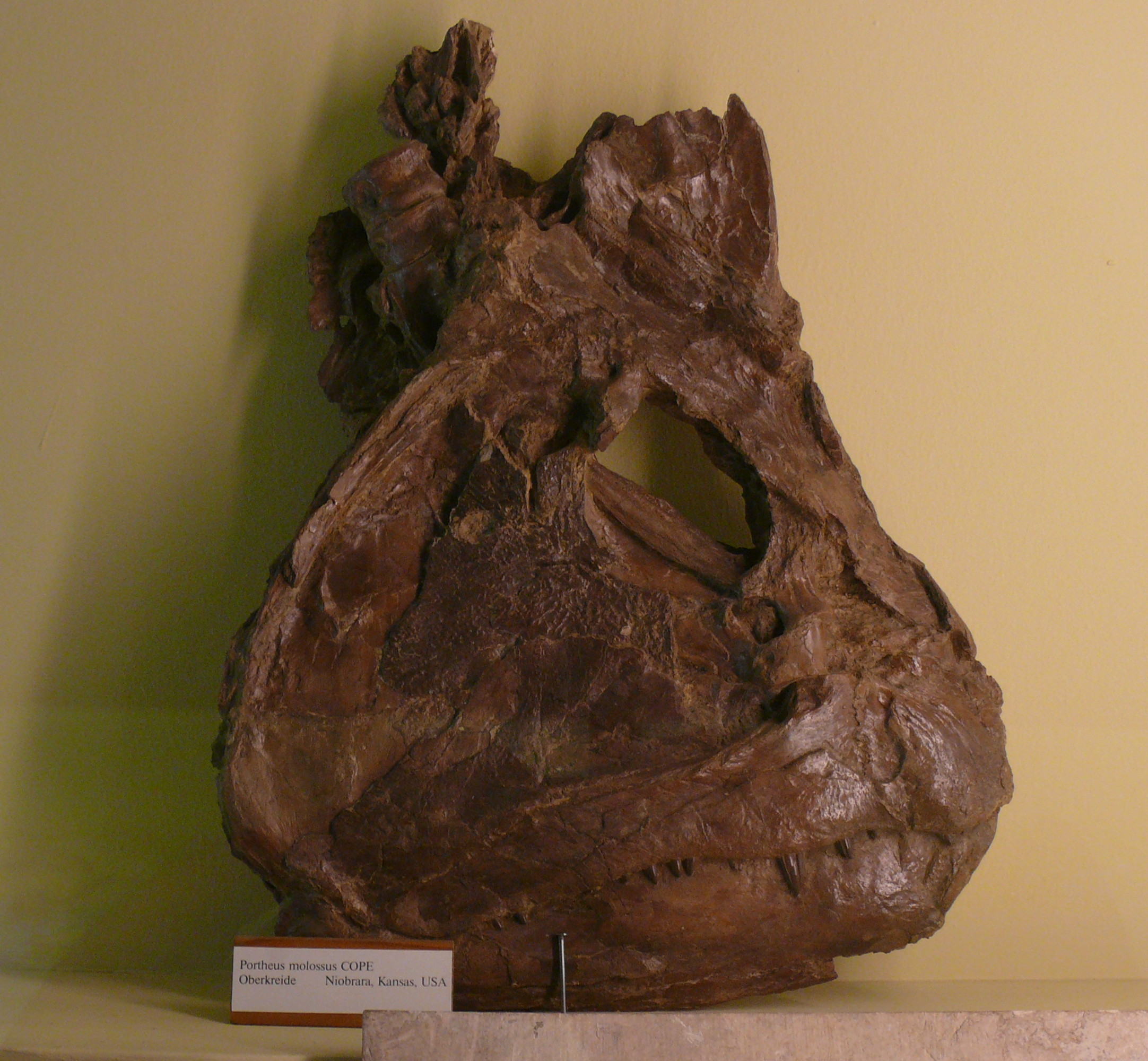 Xiphactinus audax skull , (jr synonym = Portheus molossus)